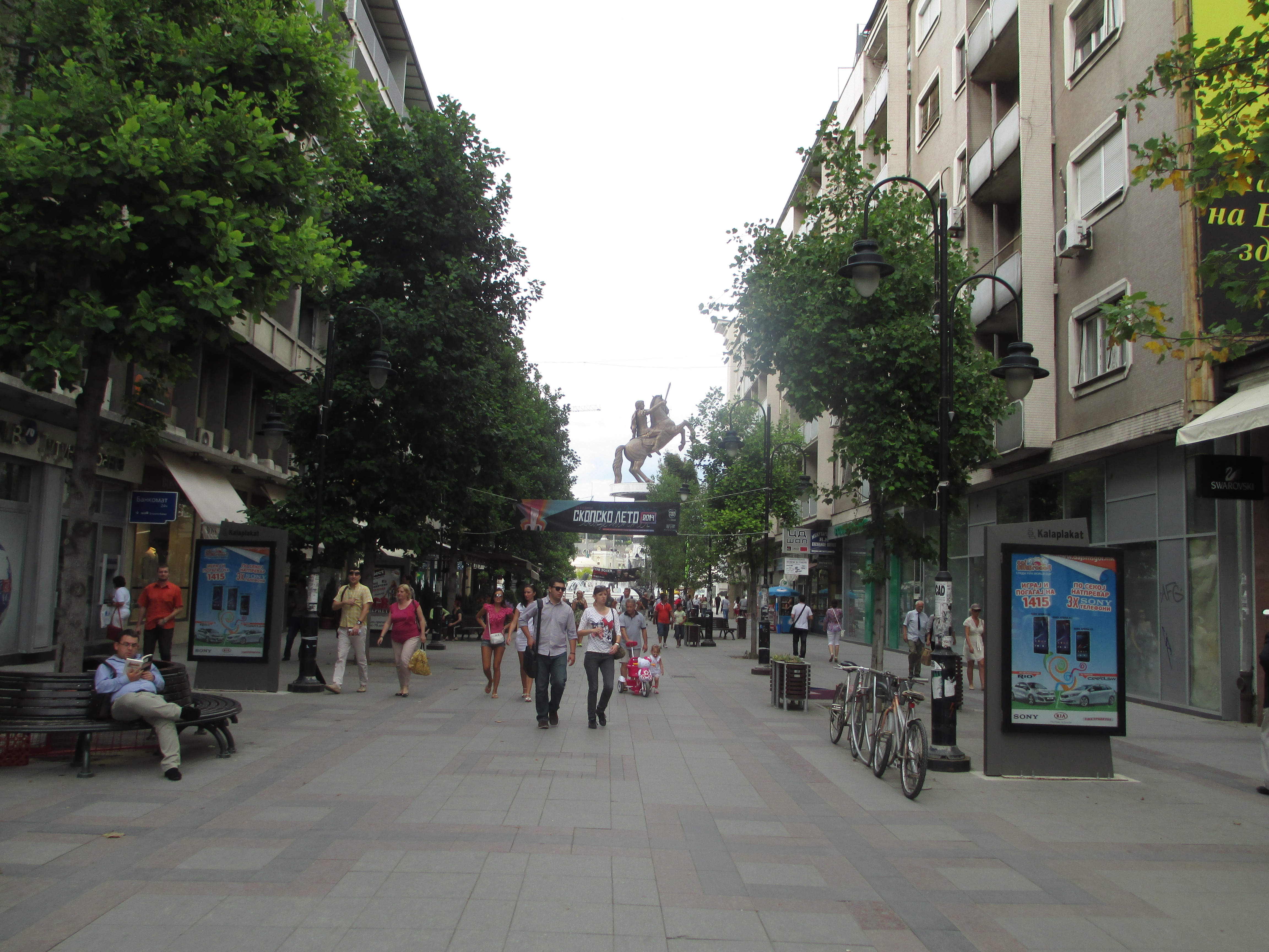 מדרחוב בסקופיה